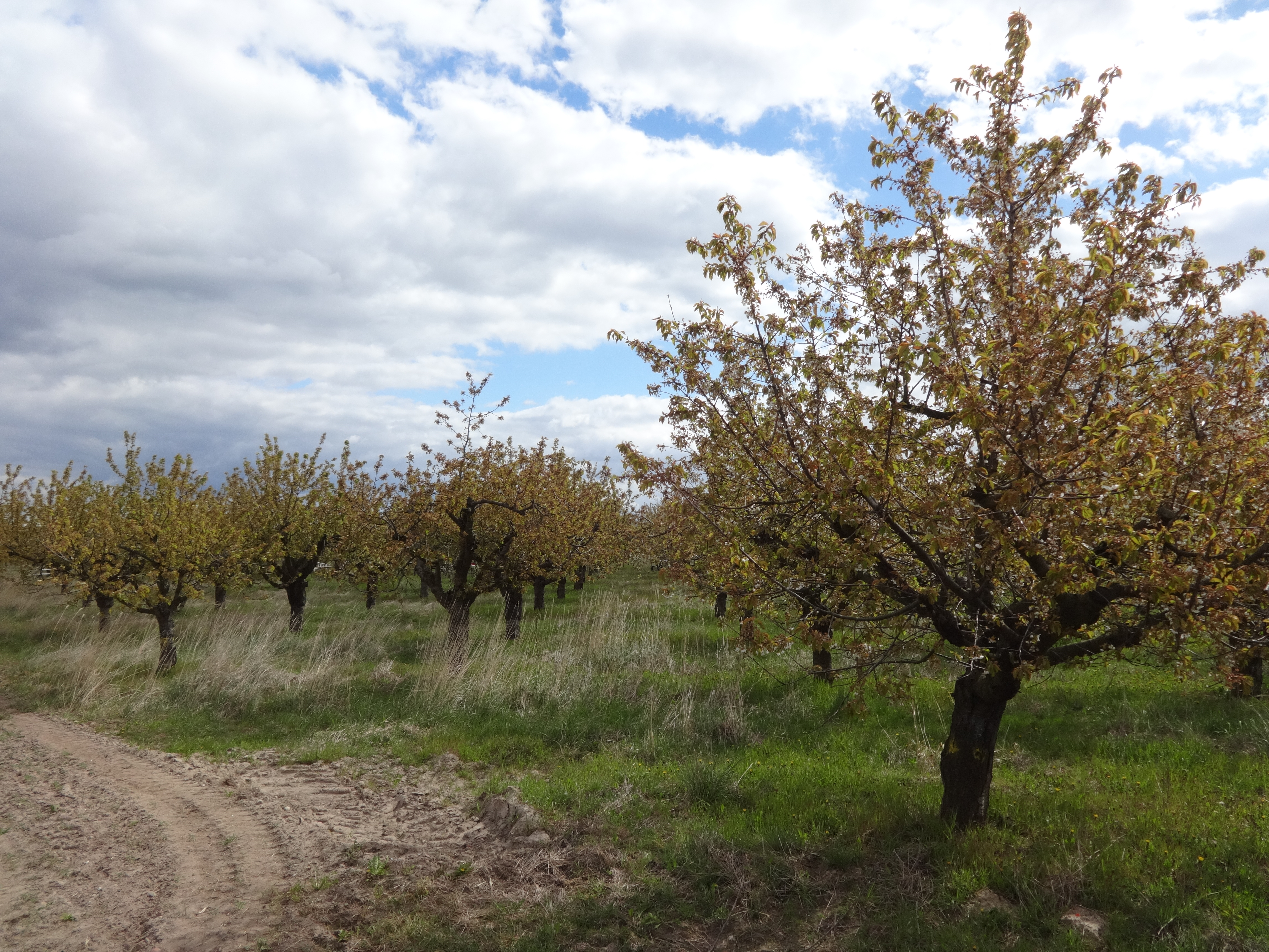 Der Panoramaweg Werderobst ist ein rund 15 Kilometer langer Lehrpfad in der Region um Werder (Havel) im Land Brandenburg. Er erschließt die Hochfläche der Zauche. mehreren Schautafeln wird insbesondere auf den Stellenwert des Obstanbaus für die Region hingewiesen.